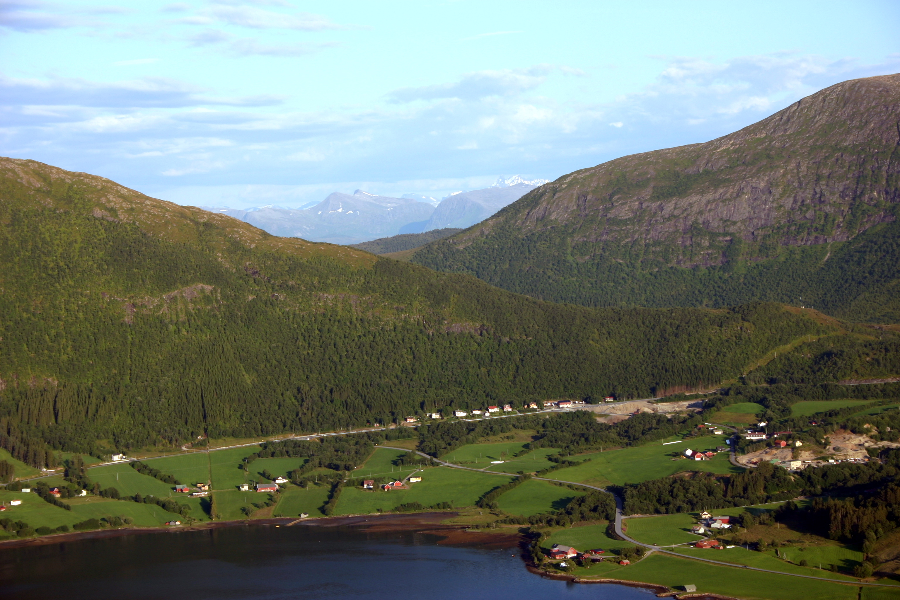 Malmefjorden